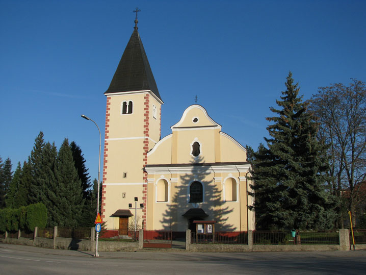 Župna crkva Uznesenja Blažene Djevice Marije, Oroslavje, Krapinsko-zagorska županija